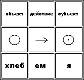 таблица порядка слов ОВС